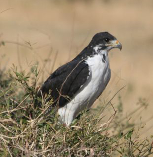 A juvenile Augur Buzzard, Mara, Kenya